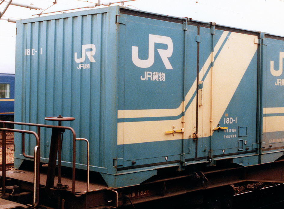 JR貨物 18D-1